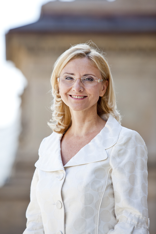 Silvia Hroncová, ředitelka Opery Národního divadla a Státní opery